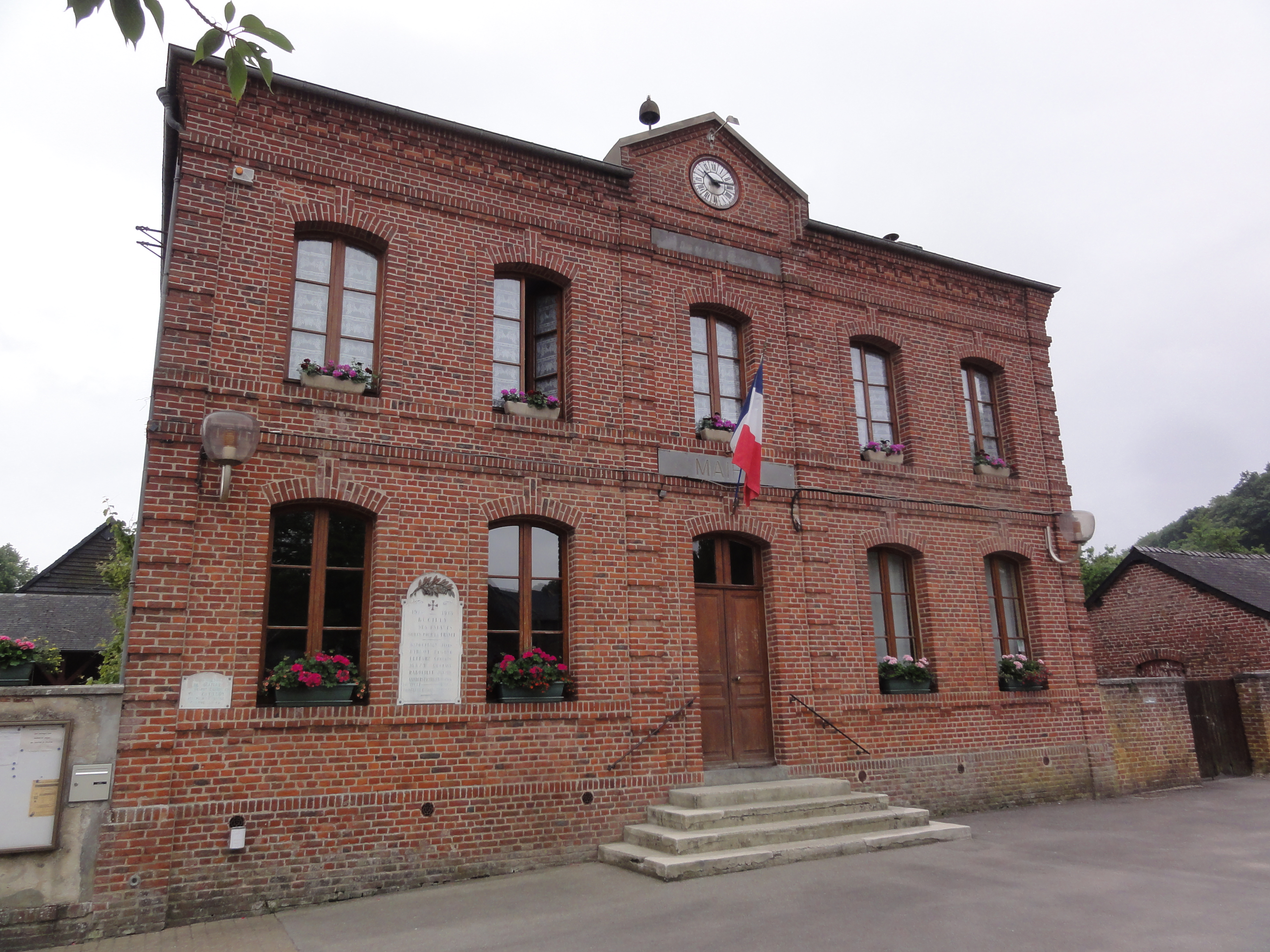 Bucilly (Aisne) lieu-dit l'abbaye